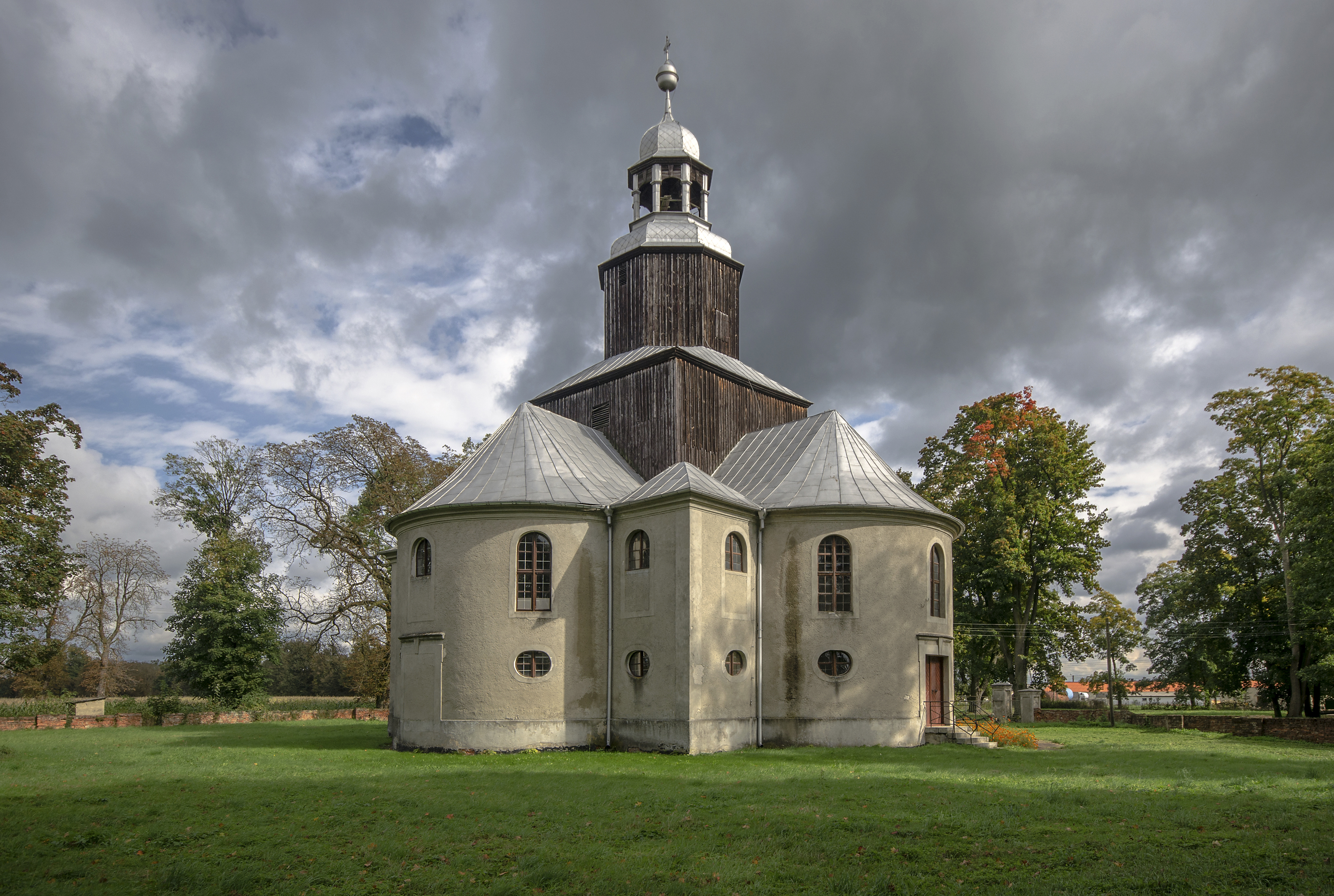 Brzezinka, kościół fil. p.w. Wniebowzięcia NMP, XVIII, 1930